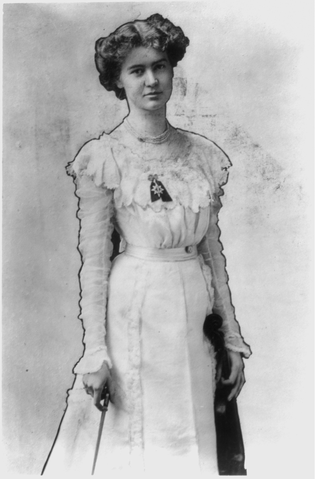 Leonora Jackson